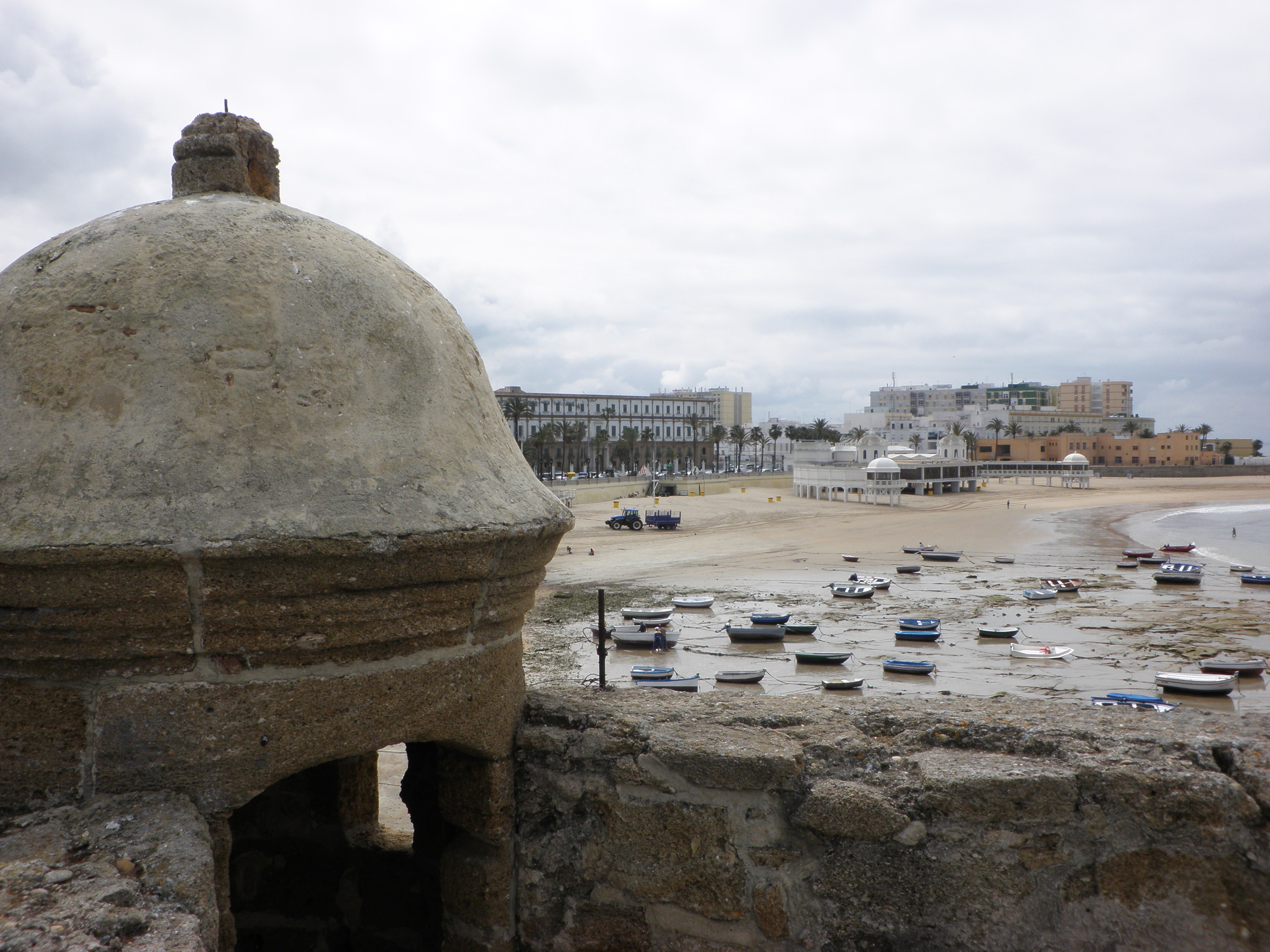 Castillo de Santa Catalina, Cádiz, España.